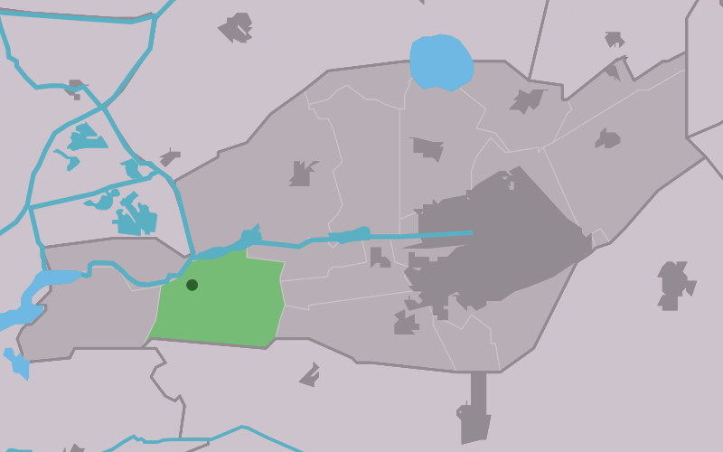 Kaartsje fan himrik fan De Feanhoop